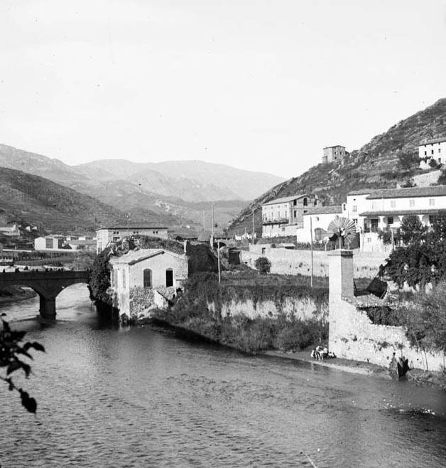 Imatge